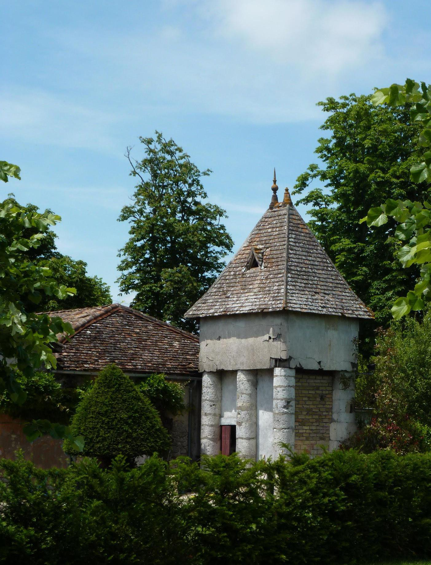 Château de la Jaubertie, village de Colombier, département de la Dordogne